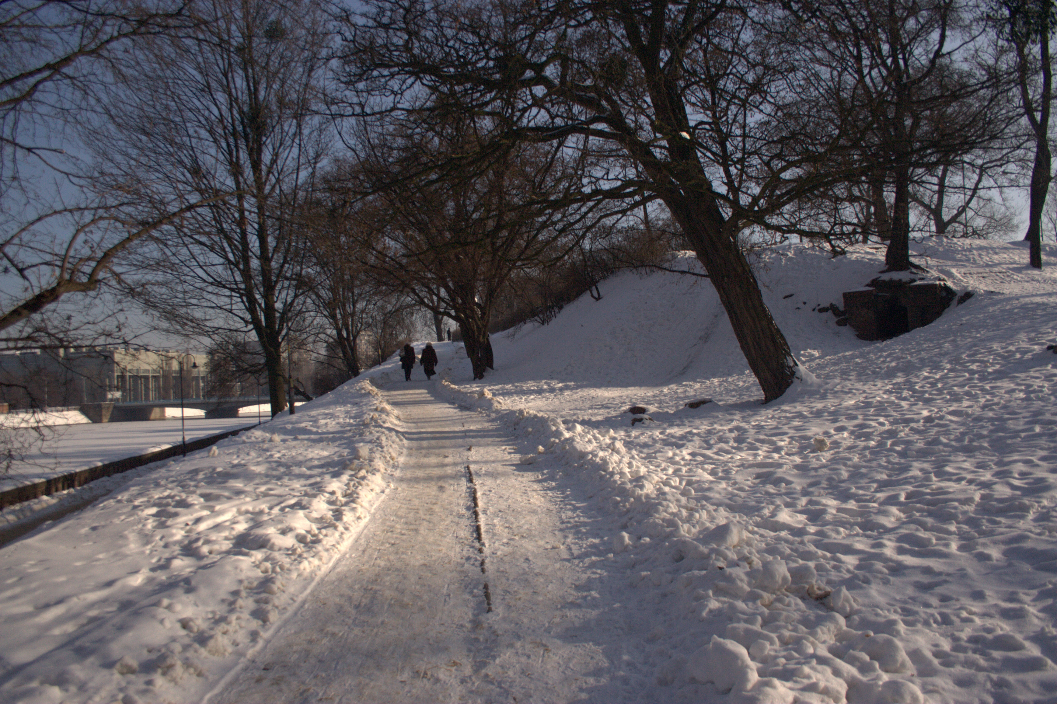 Wzgórze Polskie we Wrocławiu zimą